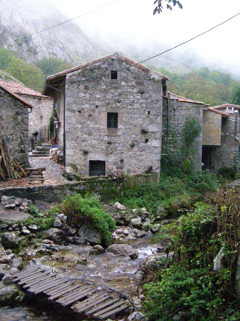 Semeya nel pueblu de Bulnes